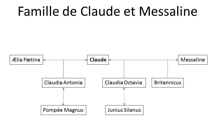 Généalogie du couple Claude-Messaline vers 41/42